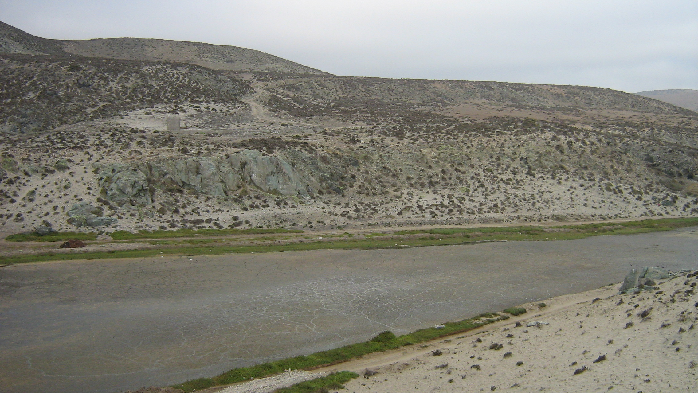 Lagoon of Cebada